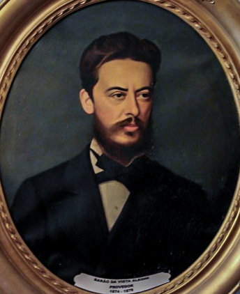 Manuel Pereira de Sousa Barros, barao de Vista Alegre